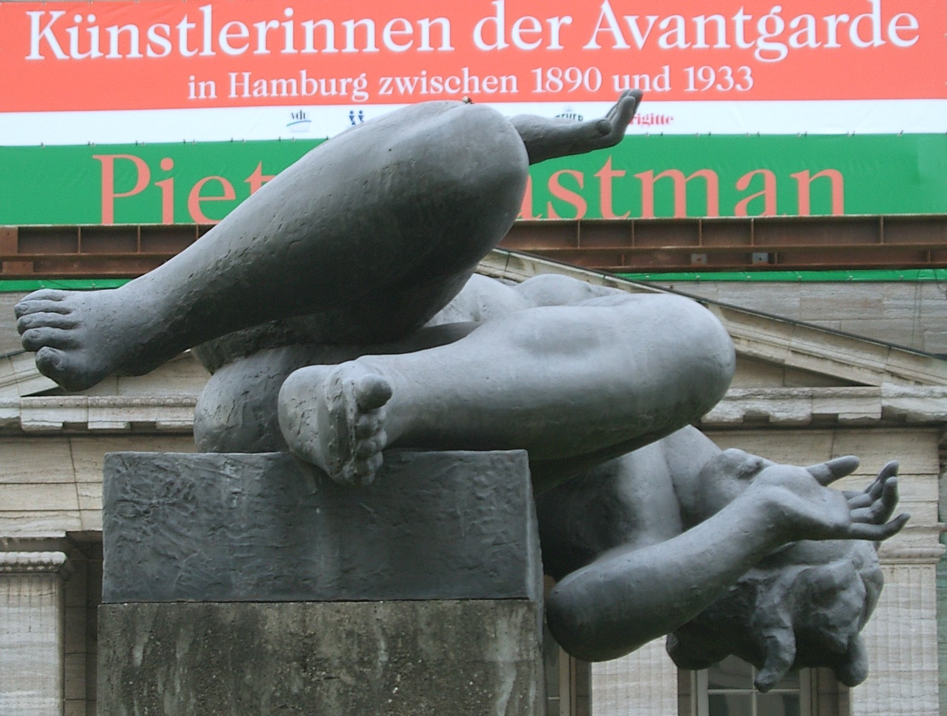 Hamburg, Kunsthalle, "Der Fluss" 1939 von Aristide Maillol (1861-1944)